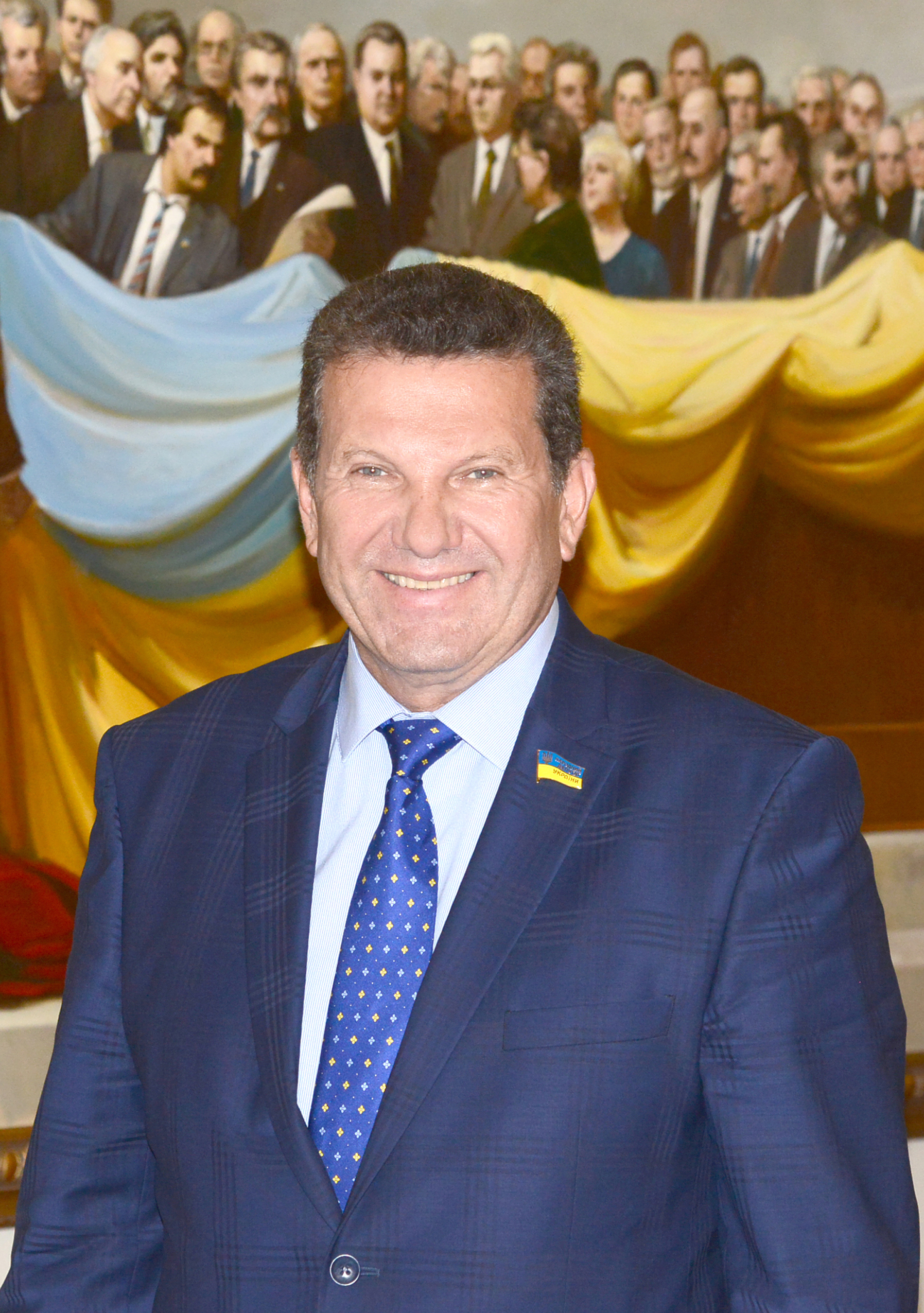 ВЕРХОВНАЯ РАДА УКРАИНЫ 2016 , фото Вадима Чуприны